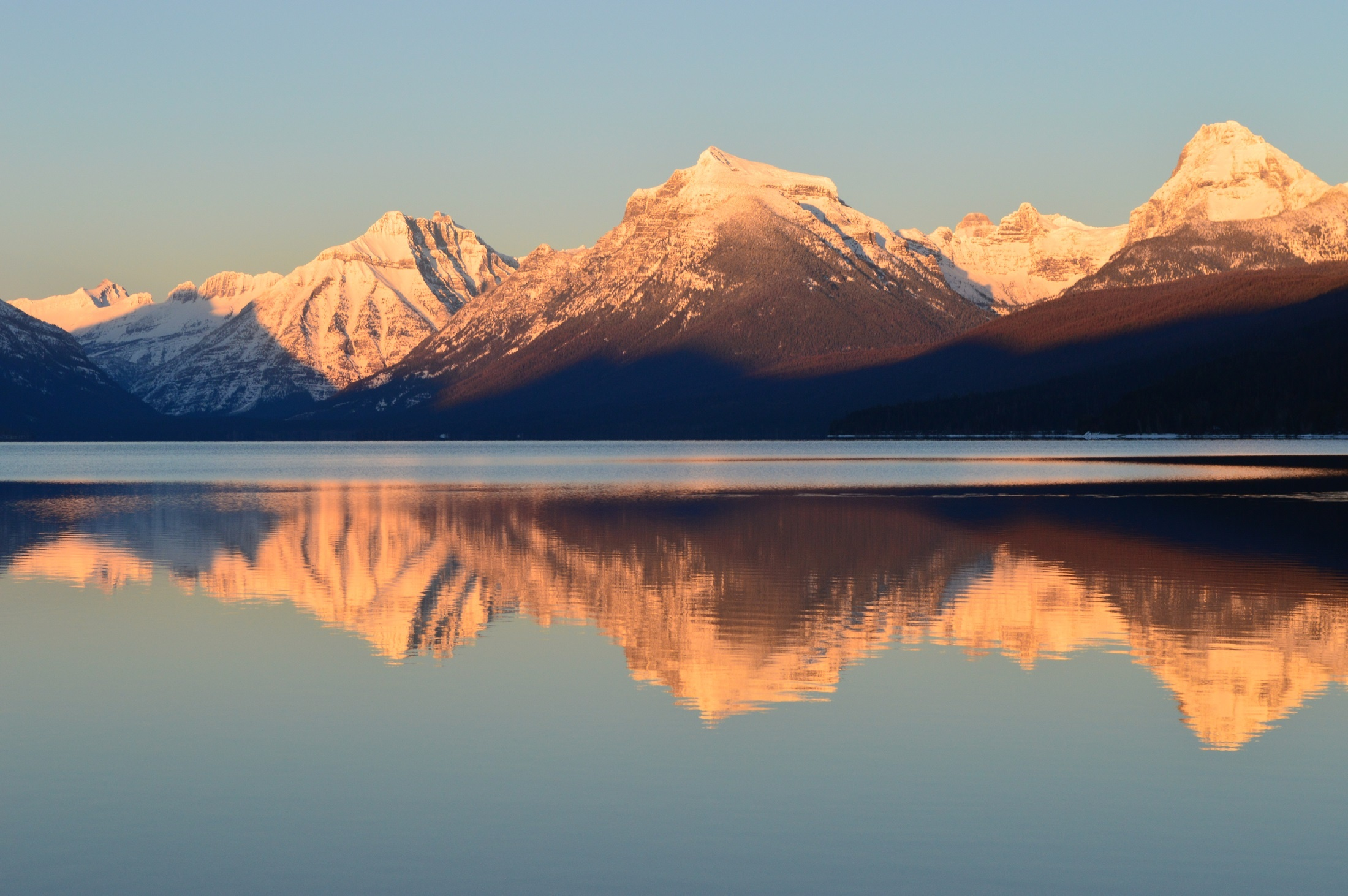 Lake McDonald 1-27-14